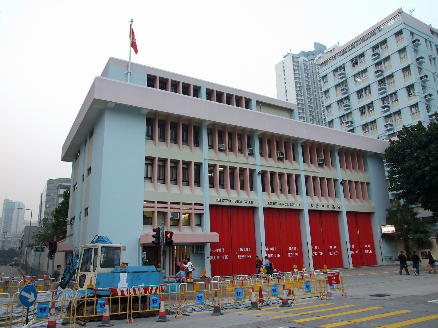 長沙灣救護站